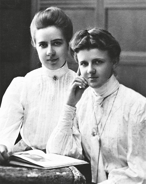 Die beiden Mathematikstudentinnen Marie Torhorst (1888-1989, rechts) und Adelheid Torhorst (1884-1968, links) im Jahr 1911